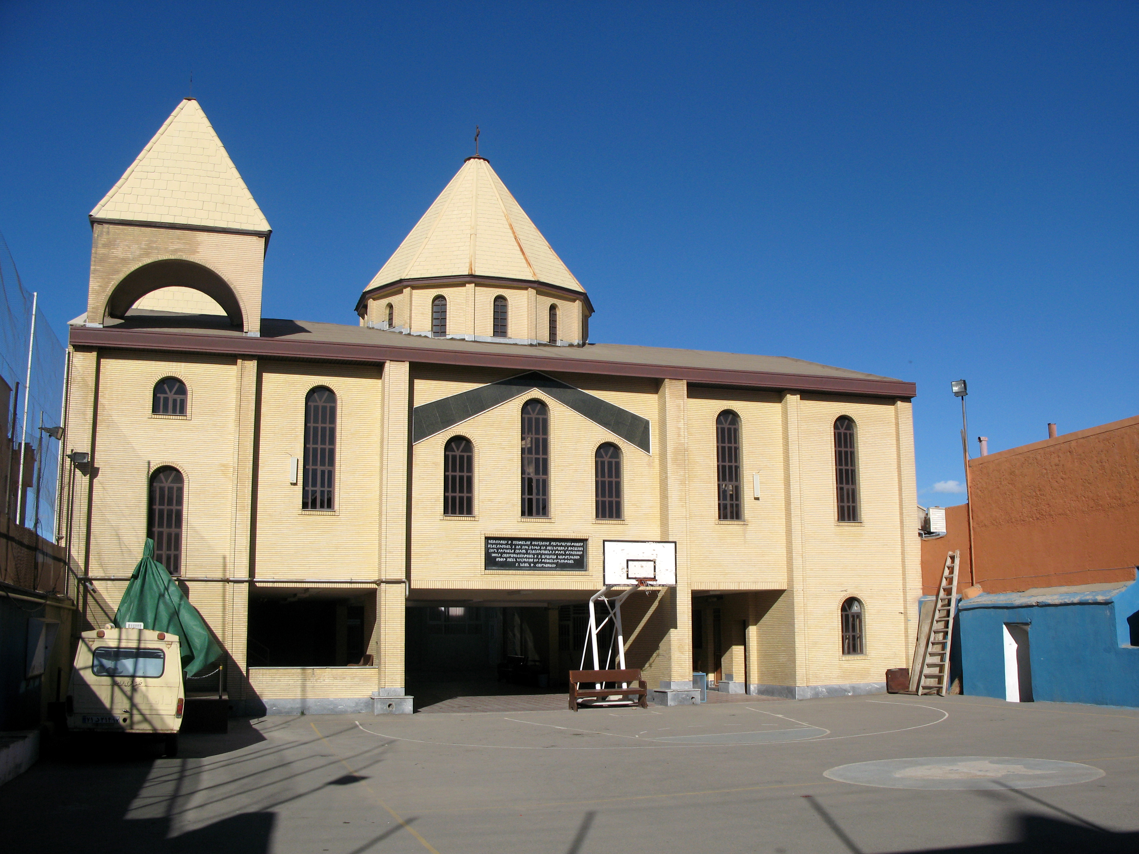 հայկական եկեղեցի Ուրմիայում